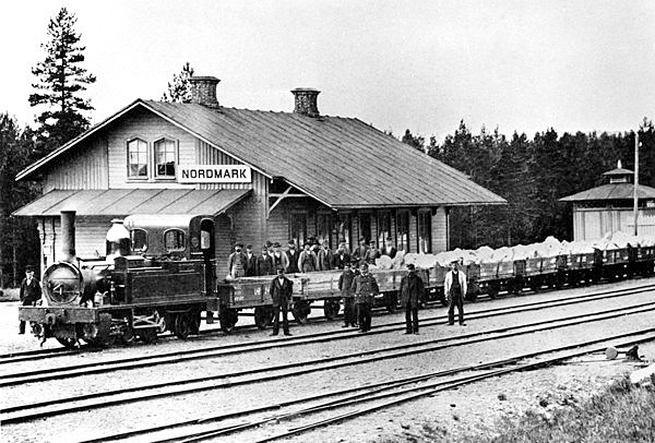 Nordmarks järnvägsstation vid Nordmark-Klarälvens Järnvägar. På bangården NKlJ´s ånglok nr 4 ”Bengt Geijer” med vagnar som är lastade med kalksten från Limkullen.